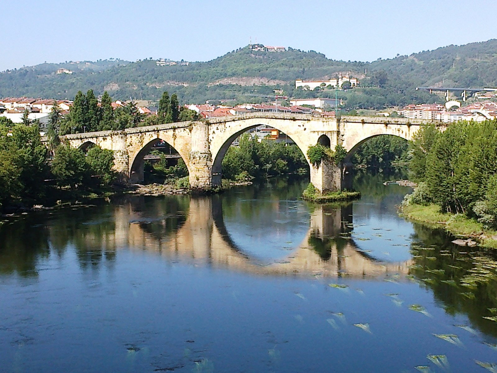 Galice Orense Pont Romain 24062012